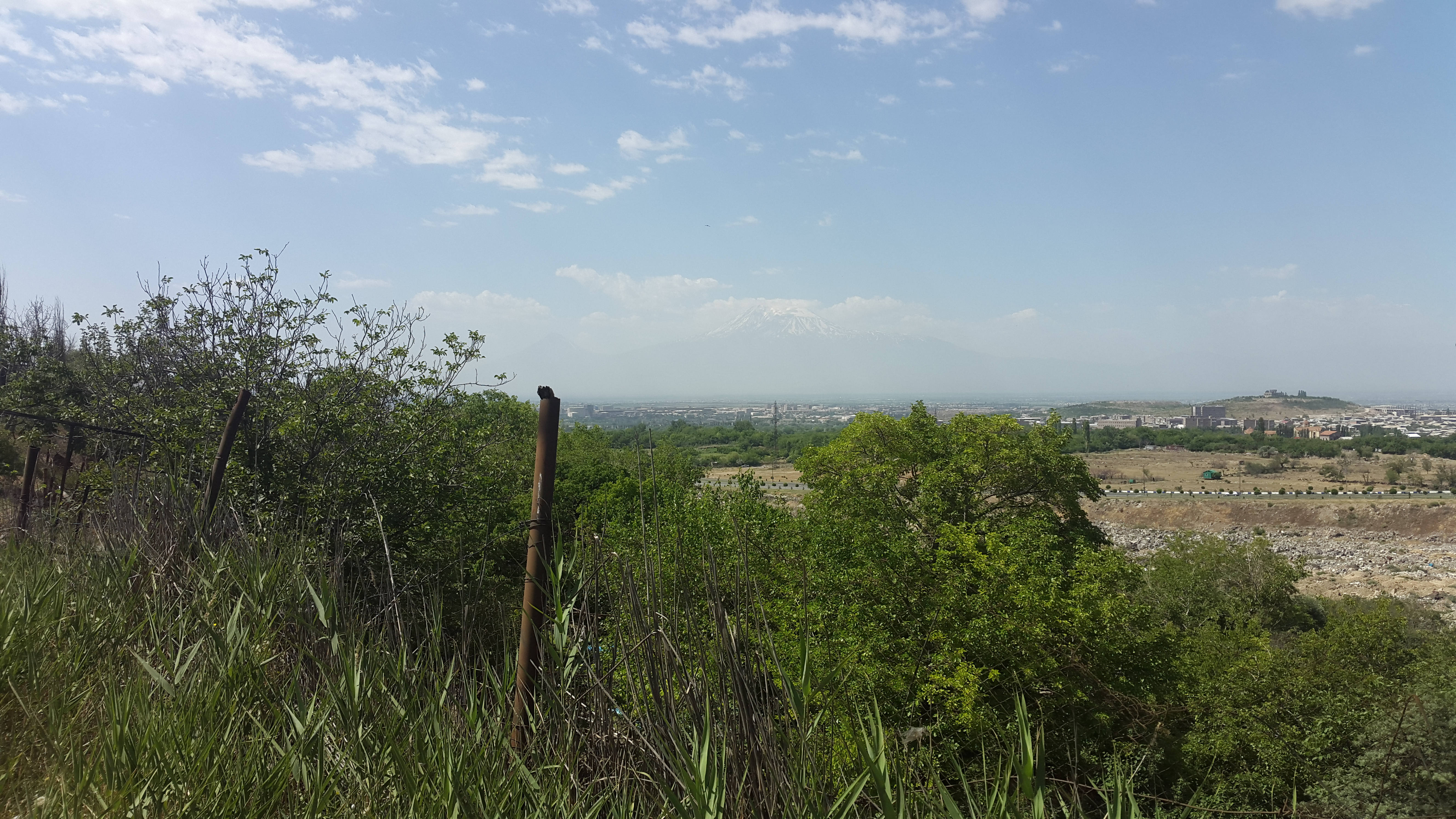 Դալմայի այգիներ